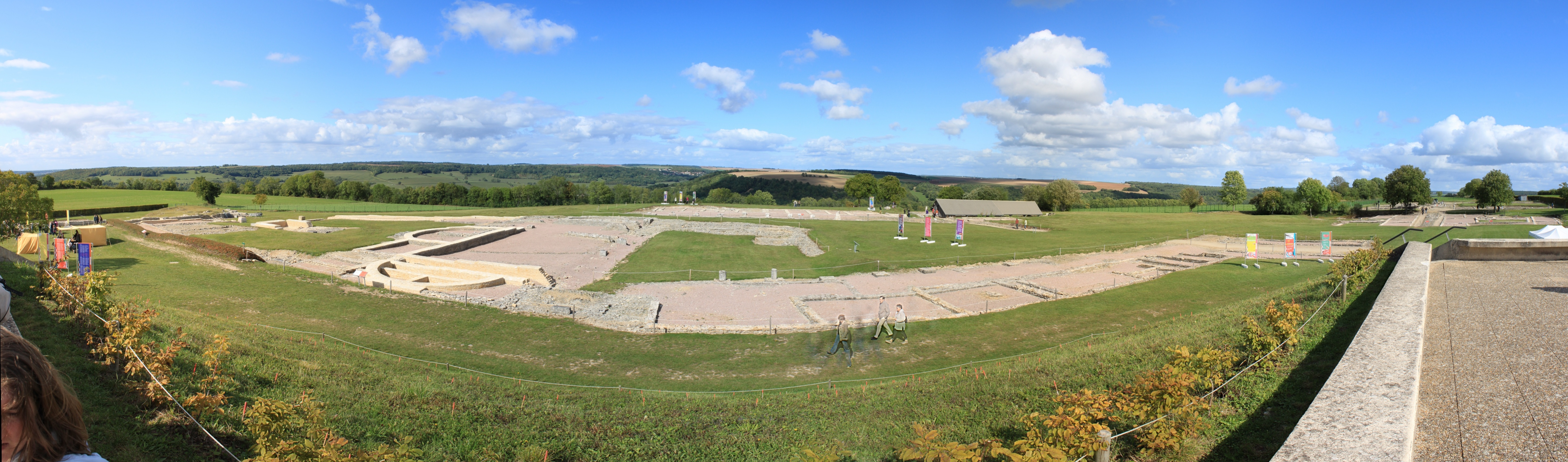 Site d'Alésia, Alise-Sainte-Reine, Côte-d'Or, Bourgogne, FRANCE